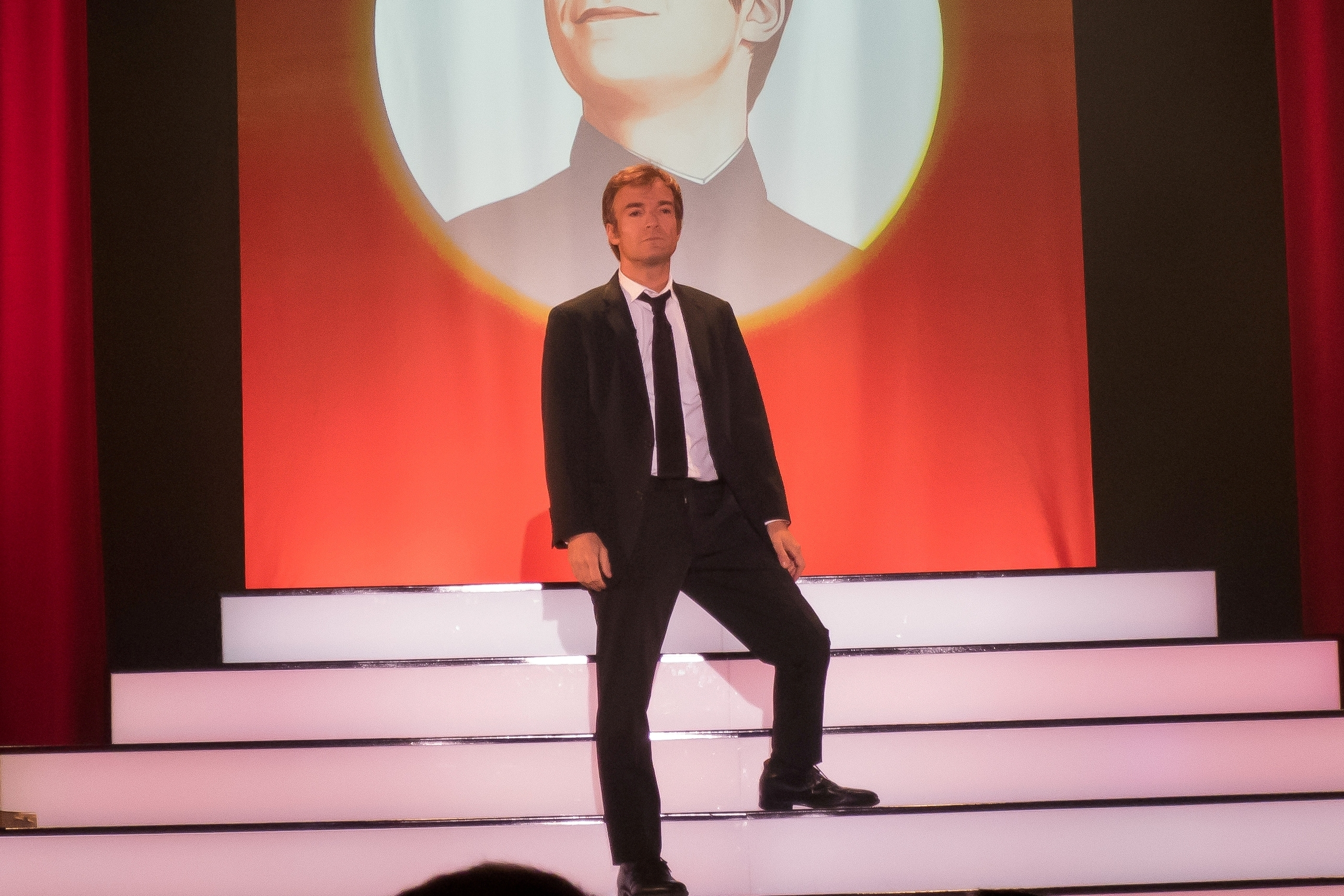 Jonathan Lambert à Villabé lors de son spectacle "Looking for Kim" qu'il a donné le 7 octobre 2016 dans la salle culturelle La Villa / Villabé, Essonne, France